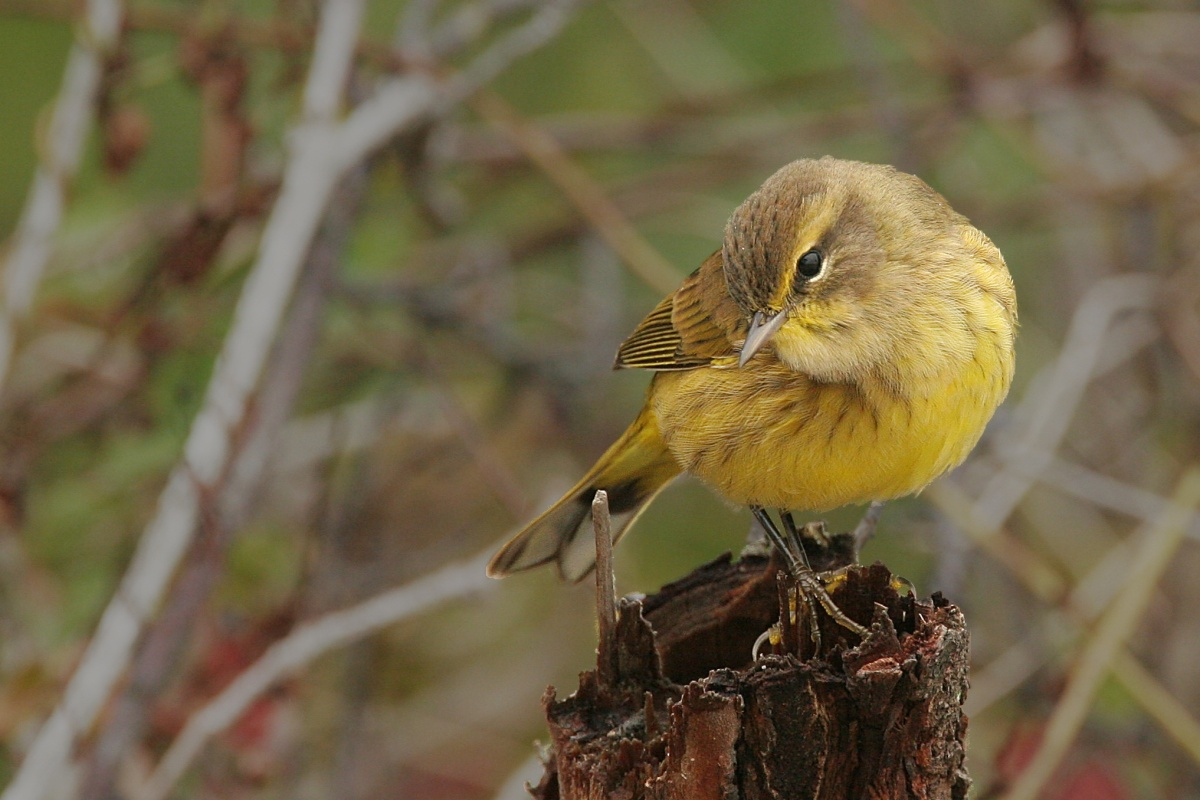 Palm Warbler/Dendroica palmarum